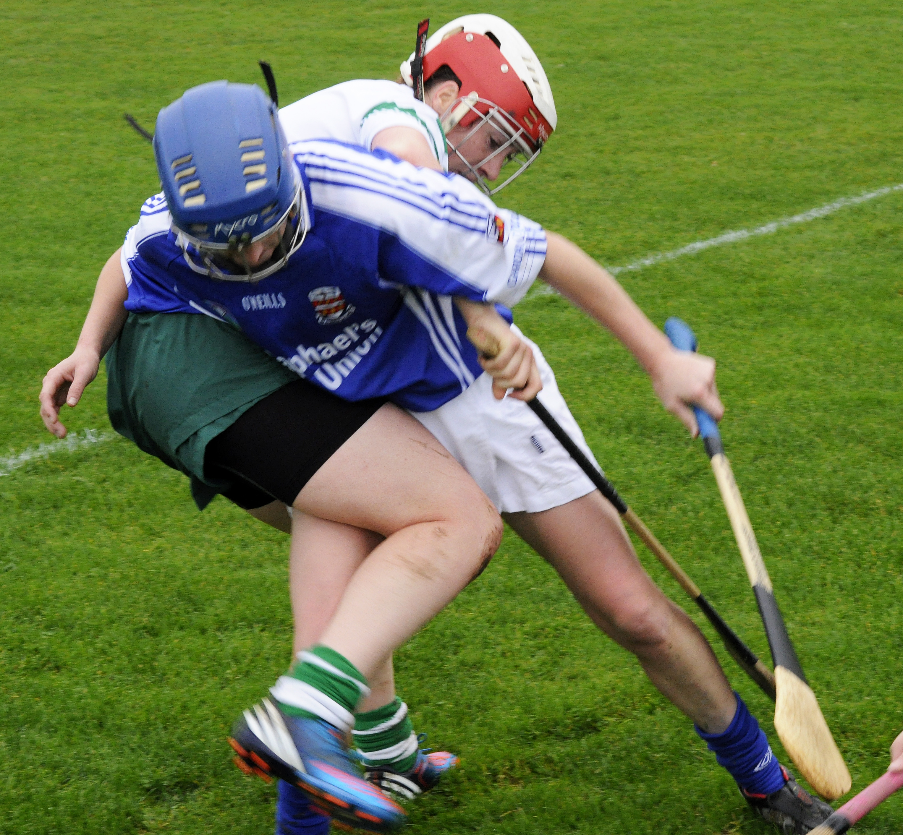 Camogie Game 24/10/12